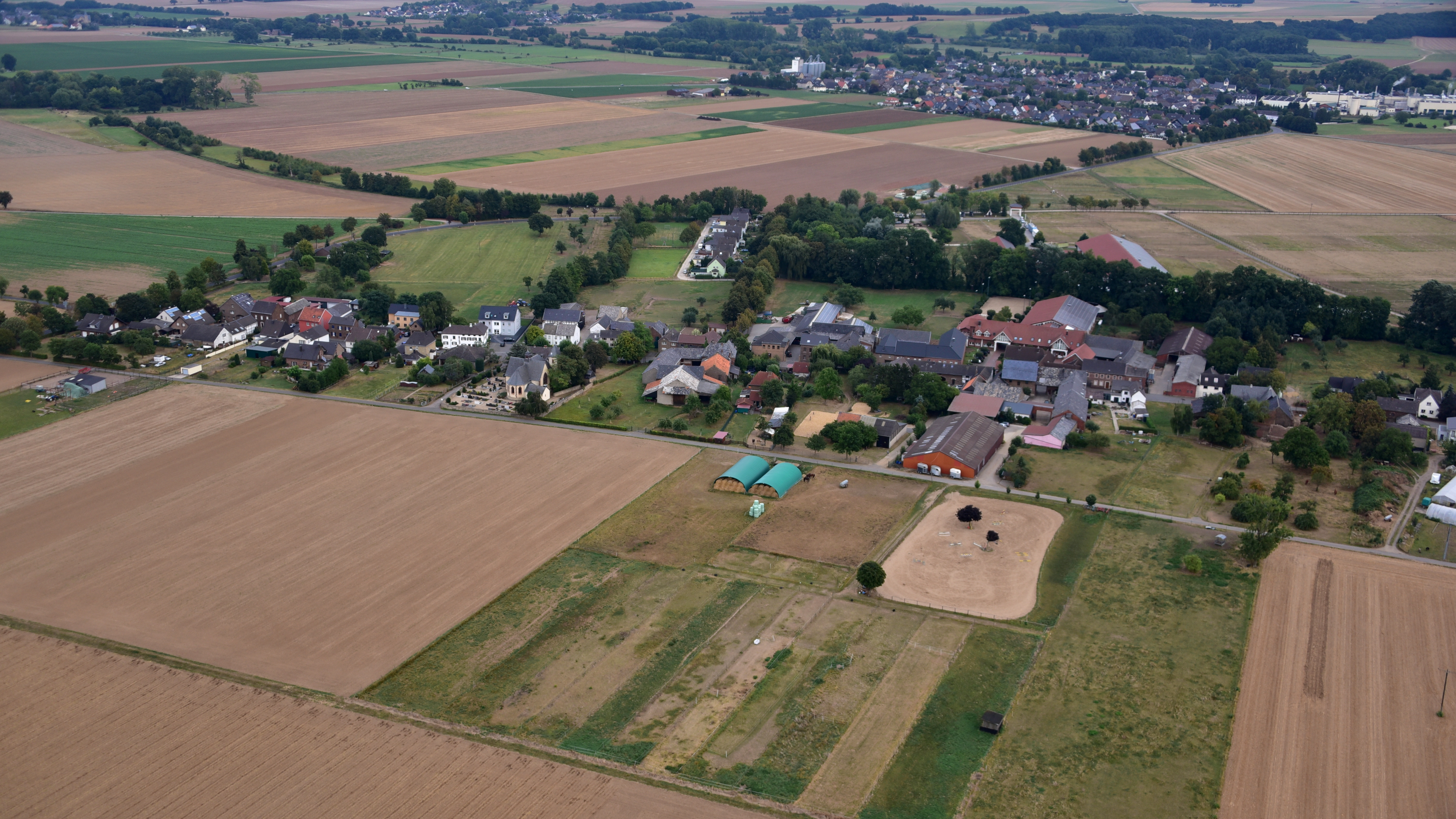 Merzenich (Zülpich), Luftaufnahme (2016)